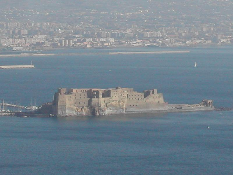 Napoli, Castel dell'Ovo da via Stazio.